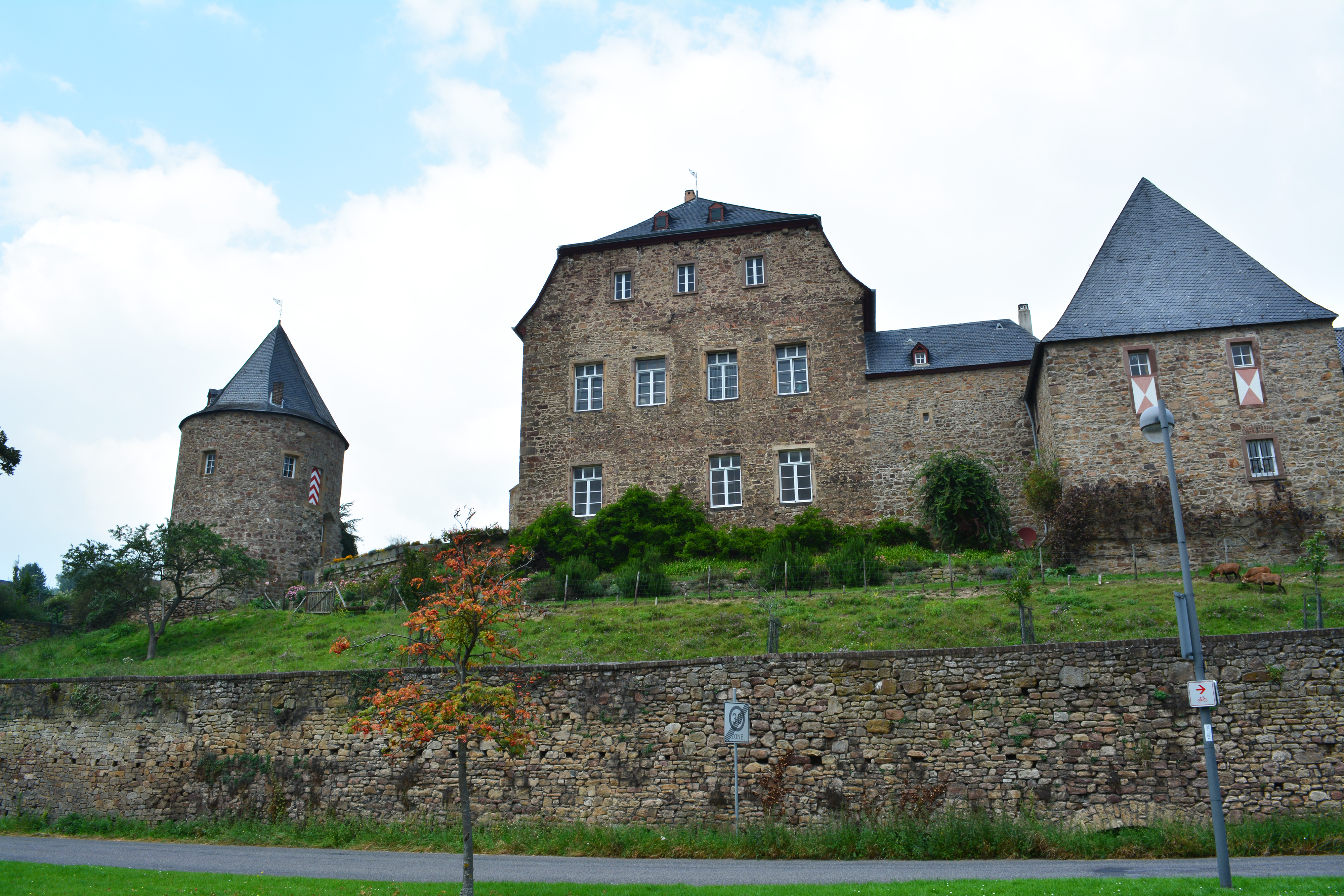 Burg Maubach This is a photograph of an architectural monument.